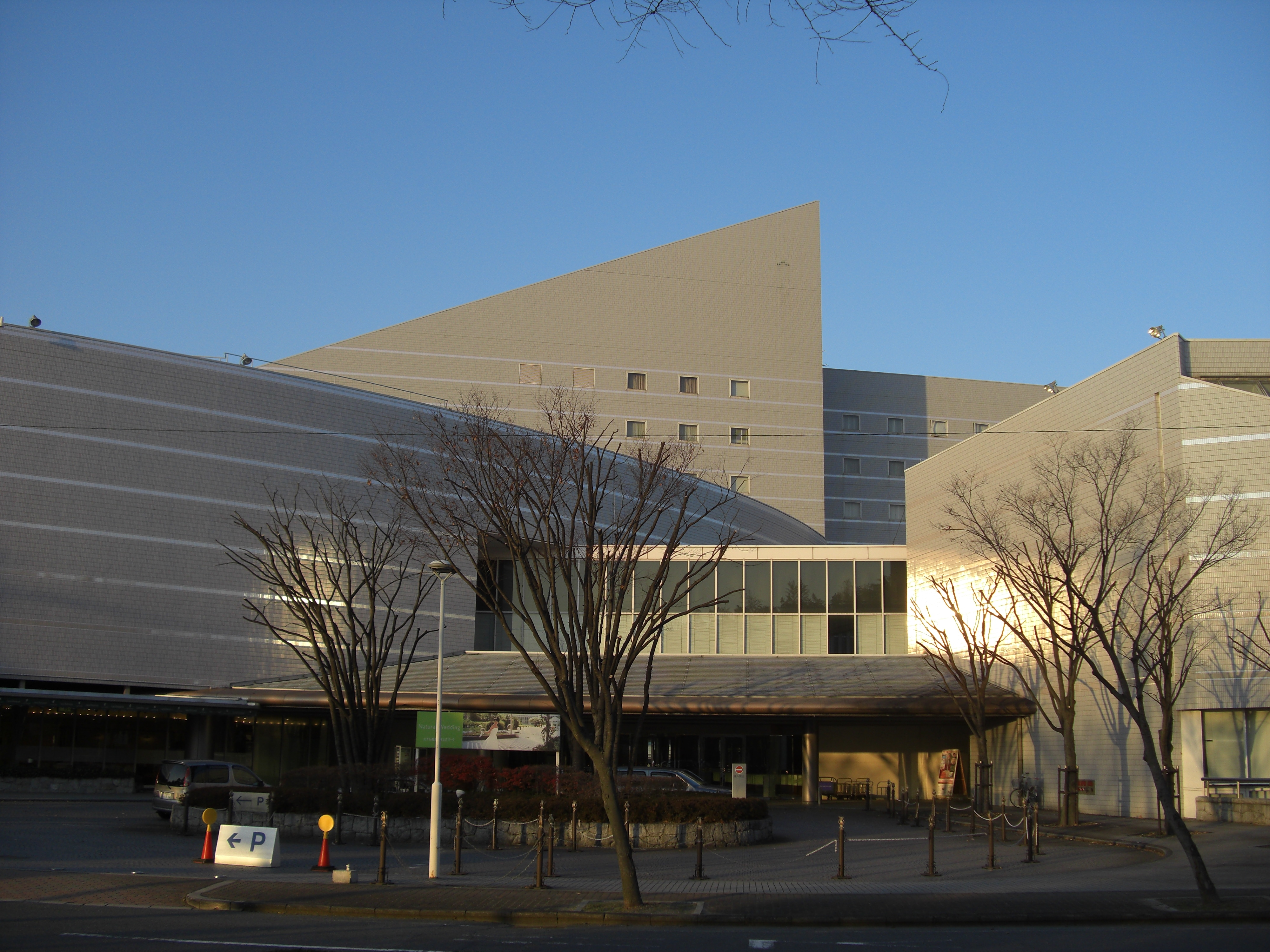 Hotel Hankyu Expo Park,Senribanpakukouen Suita-City Osaka Japan.